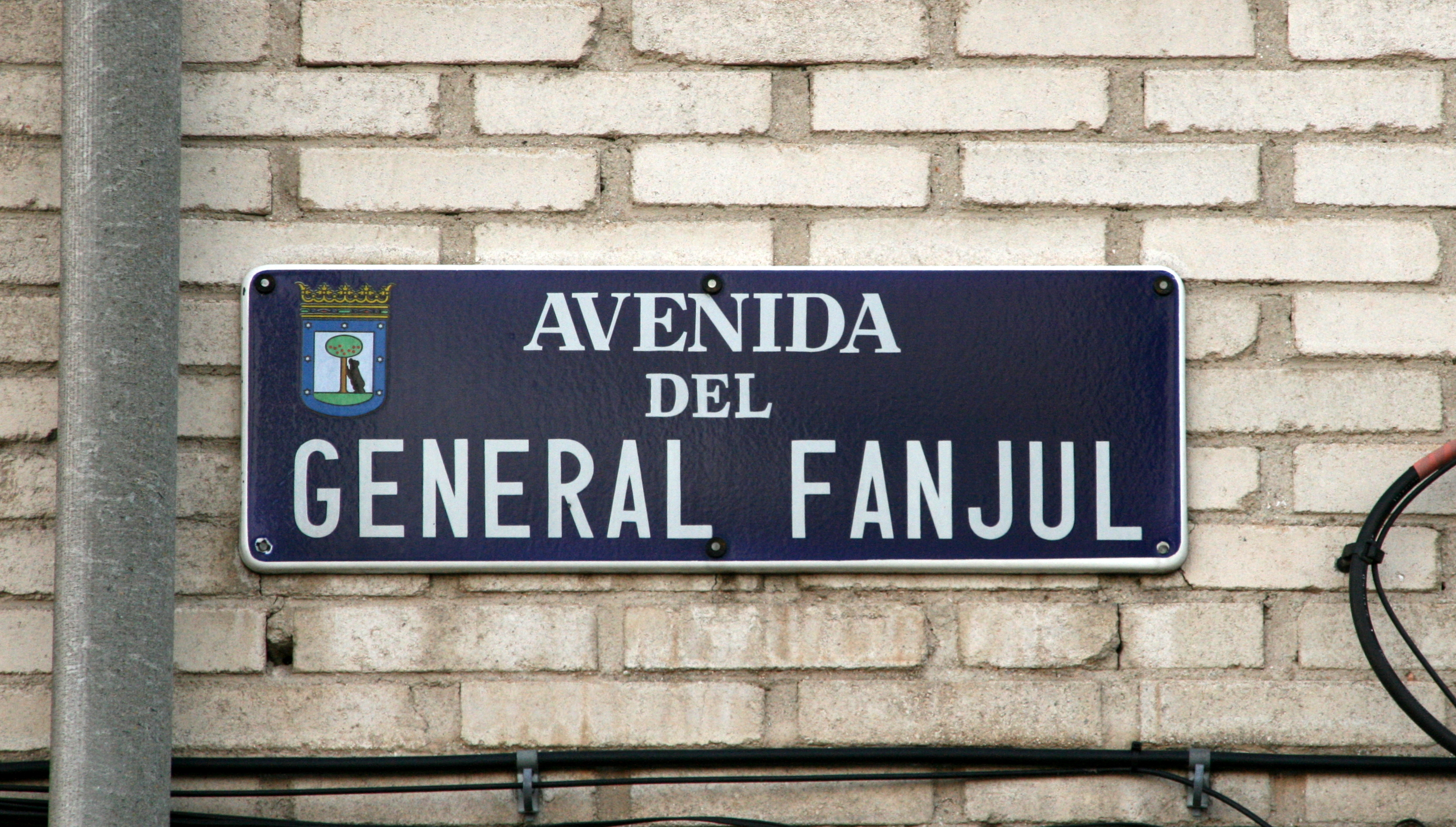 Placa de la calle General Fanjul, en el distrito madrileño de Latina, barrio de Las Águilas